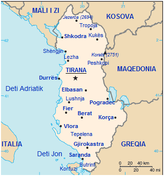 Map of Albania (albanian lang.)